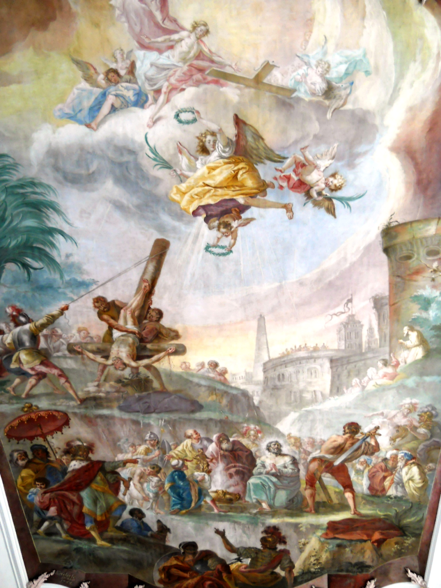 Genderkingen (Landkreis Donau-Ries), Pfarrkirche St. Peter und Paul, Langhaus-Deckengemälde von Johann Baptist Enderle